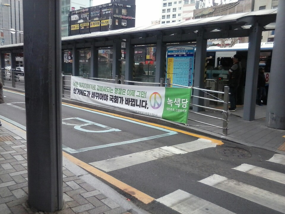 한국녹색당 현수막